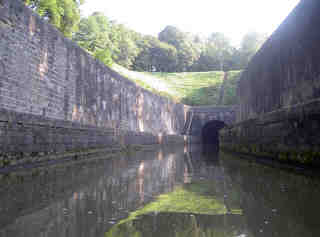 Tunnel de Saint Albin, entrée aval. Construit au XIXème siècle. Classé Monument Historique. Auteur : vincent lucas